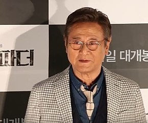 [TV10] '그랜드 파더' 박근형이 밝힌 액션 촬영 비하인드 (언론시사회)